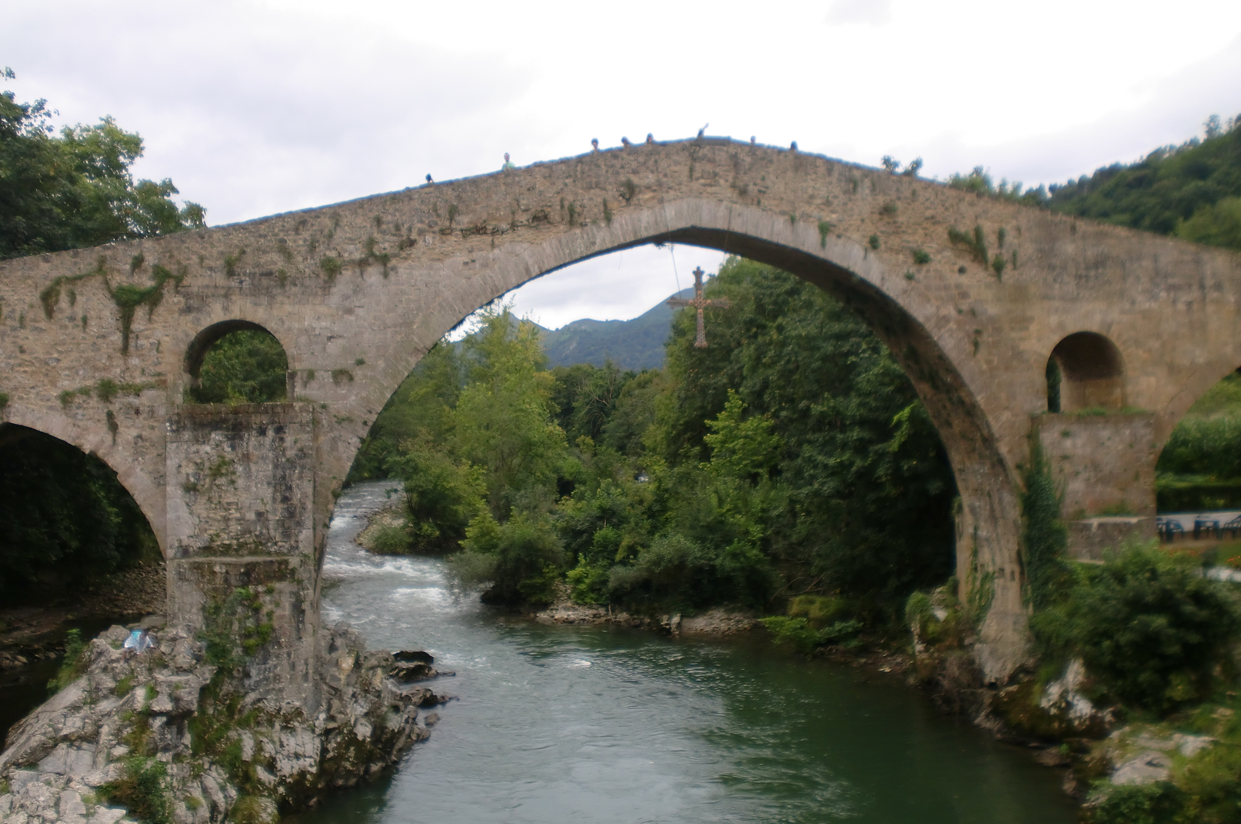 Construído durante el reinado de Alfonso XI, de él pende una reproducción de la Cruz de la Victoria.